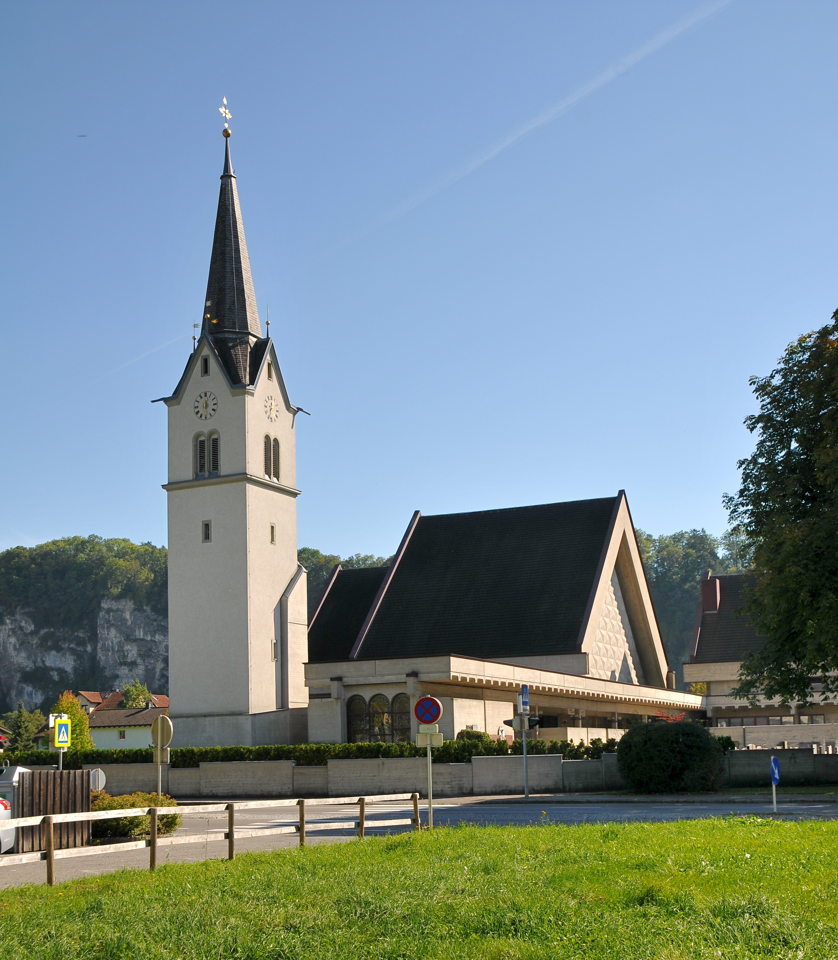 Neue Pfarrkirche hll. Kornelius und Cyprian in Tosters, Feldkirch.